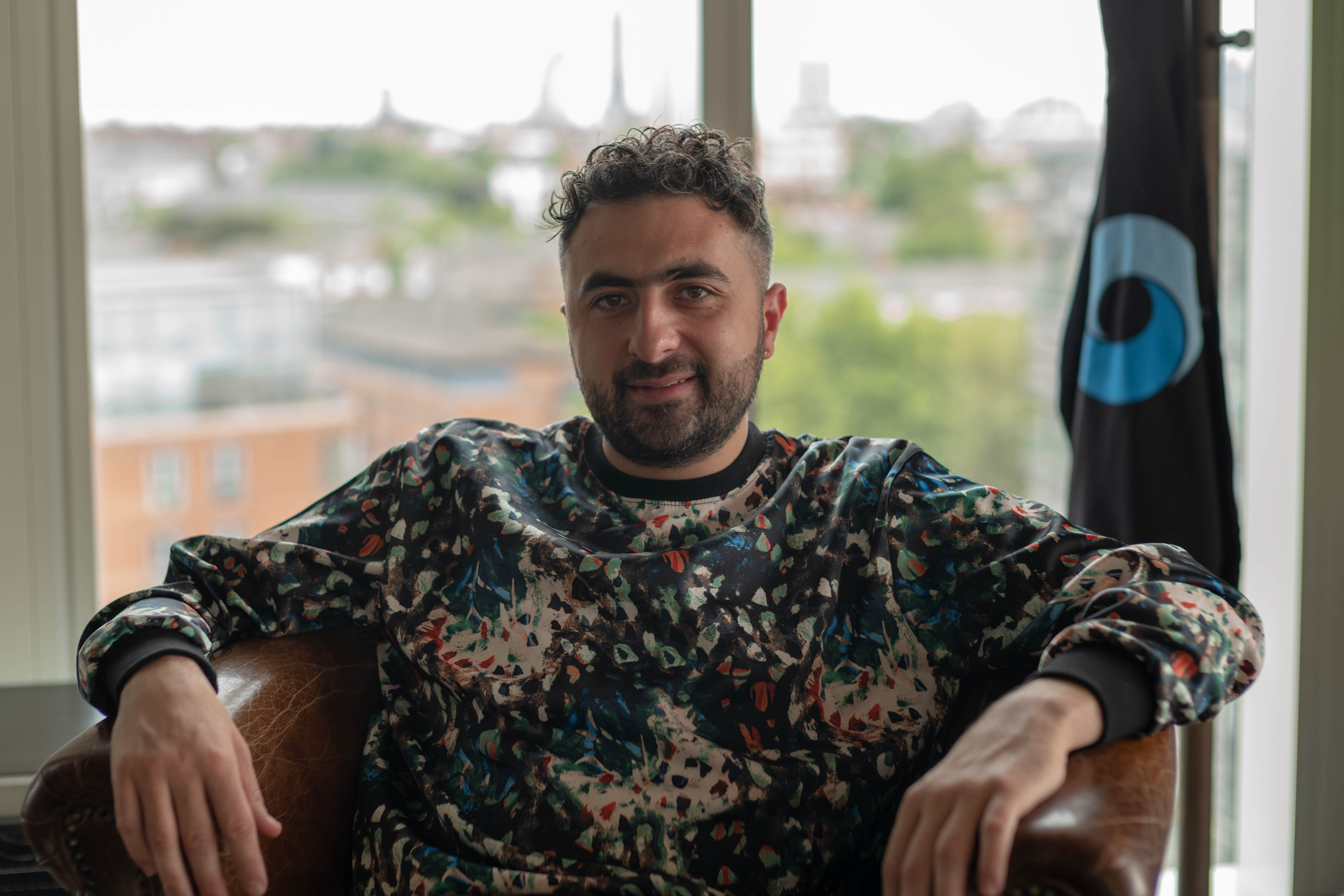 Mustafa Suleyman